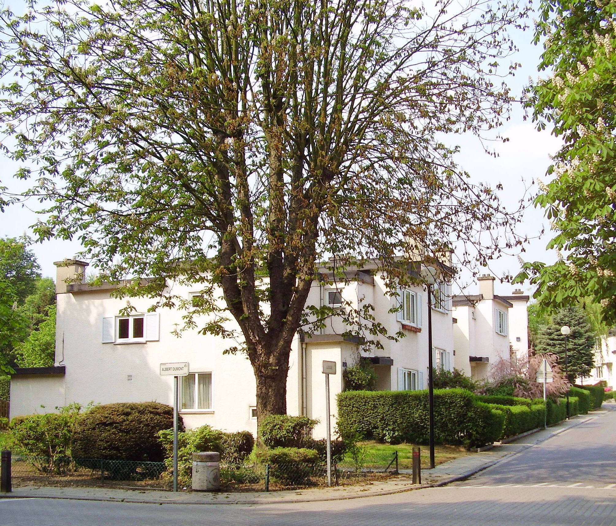 Cité-jardin de Kapelleveld, Woluwe-Saint-Lambert (Bruxelles)